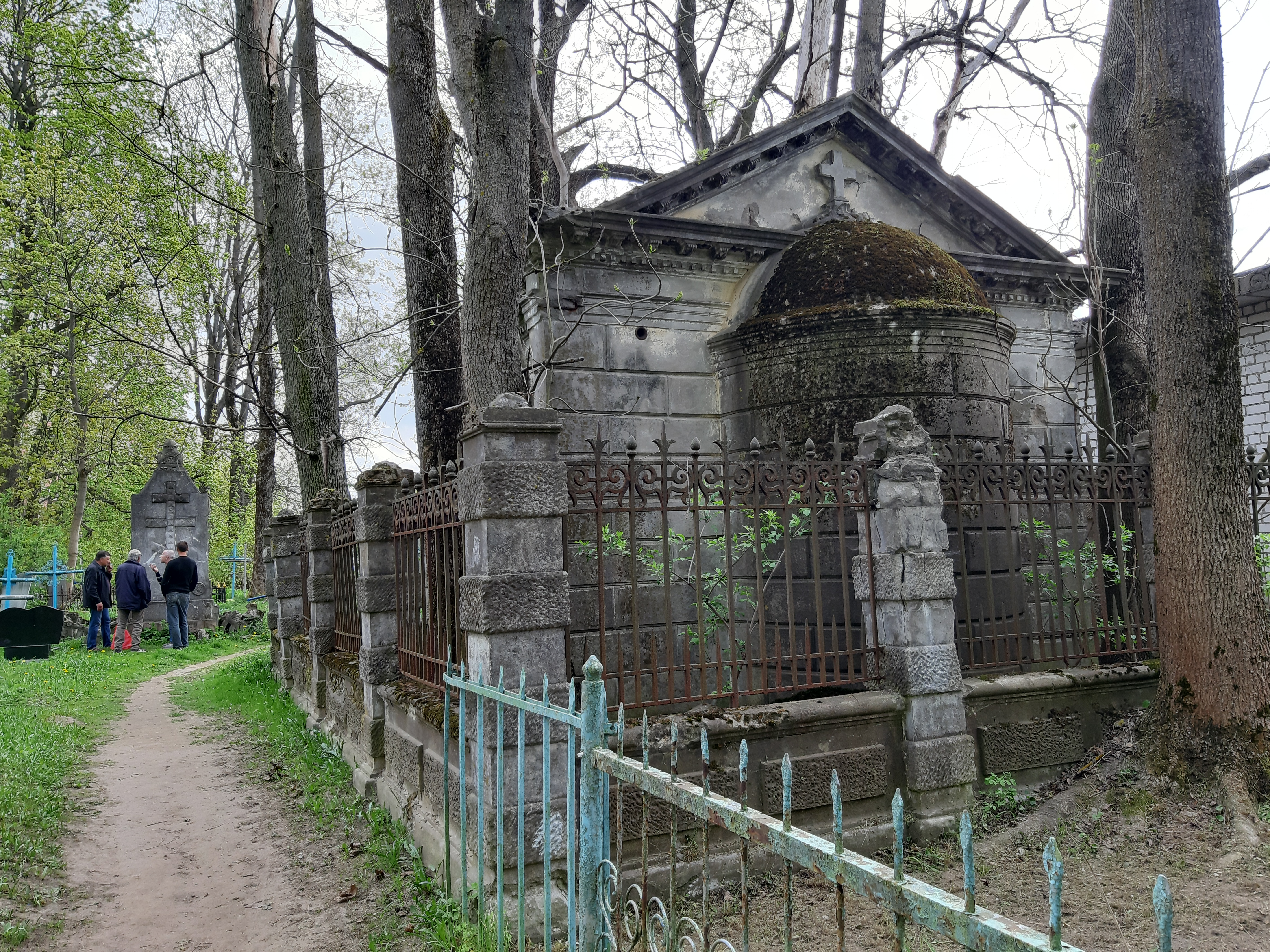 Магілёў. Успенскія могілкі